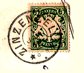 Bayern Wappenausgabe 5 Pfg. dunkelgrün entwertet in der Kgl. Postagentur Zinzenzell